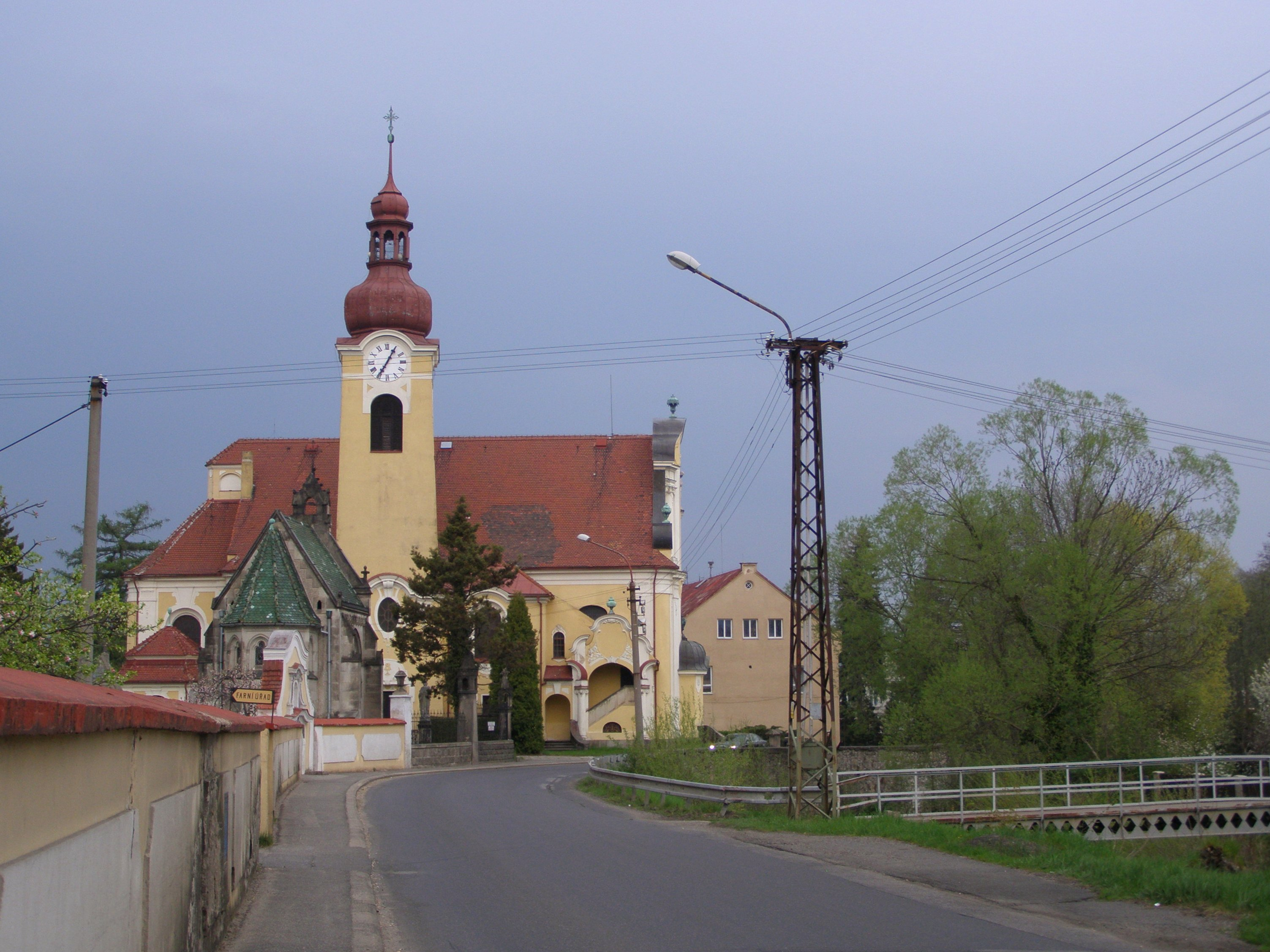 Raspenava, ulice Fučíkova, kostel Nanebevzetí Panny Marie